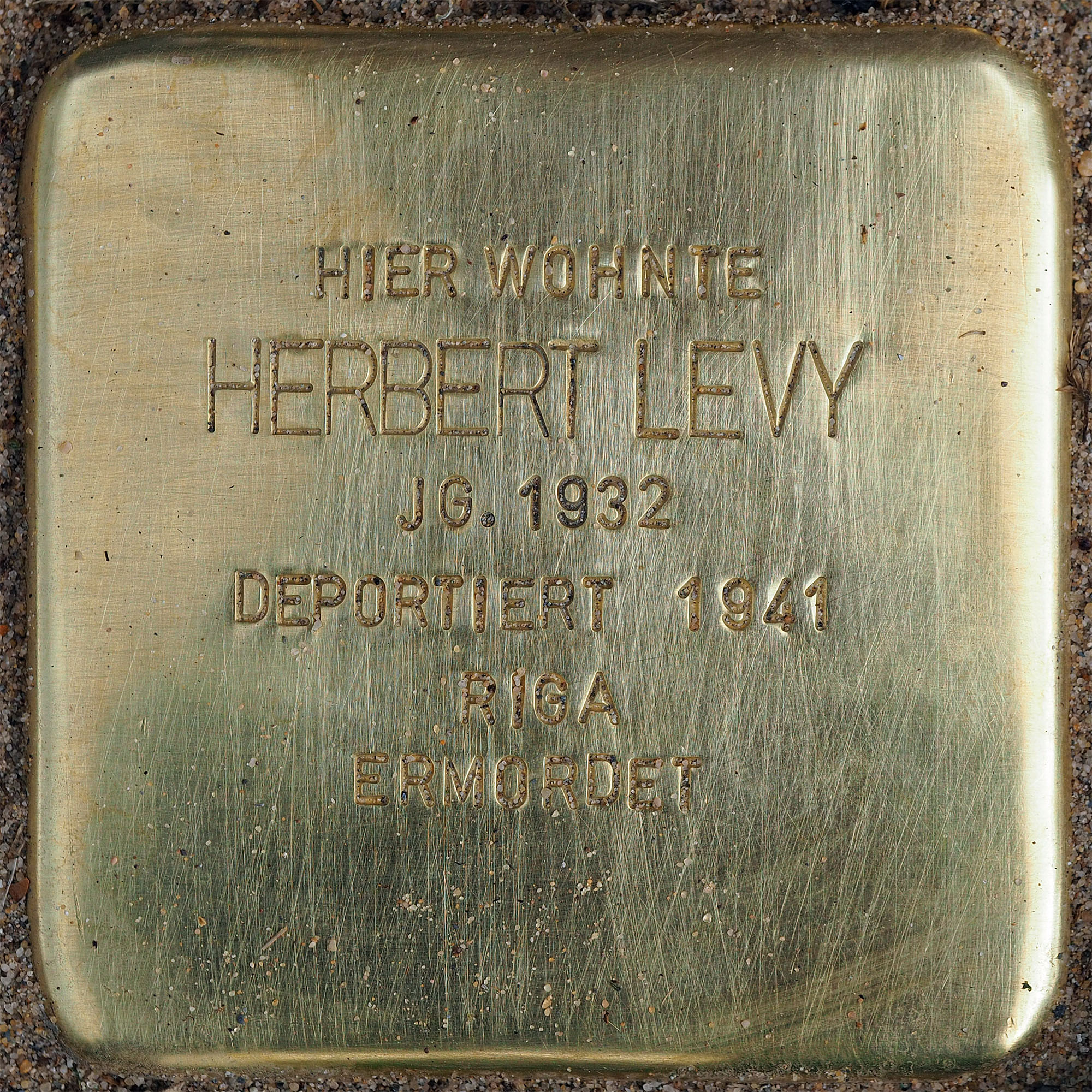 Stolpersteine Suechteln: Levy, Herbert